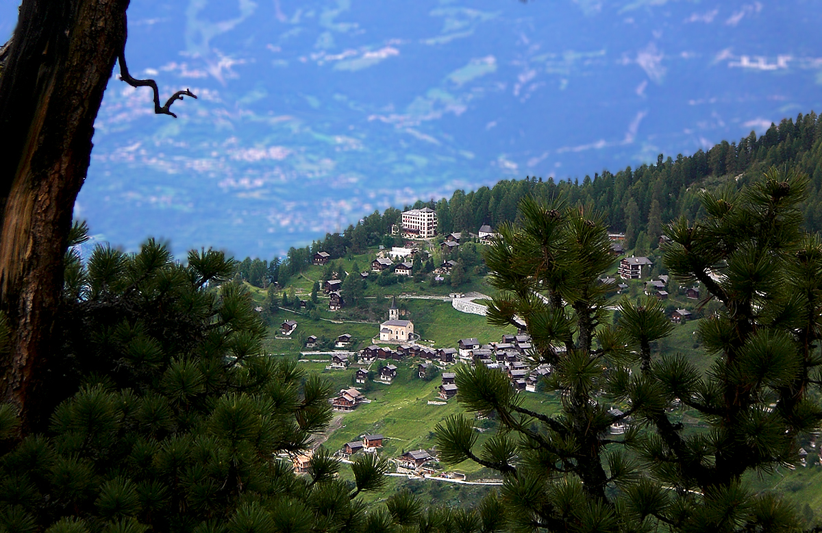 Grand Hotel Chandolin Oberhalb des Ortes Chandolin mit Blick auf das Rhonetal